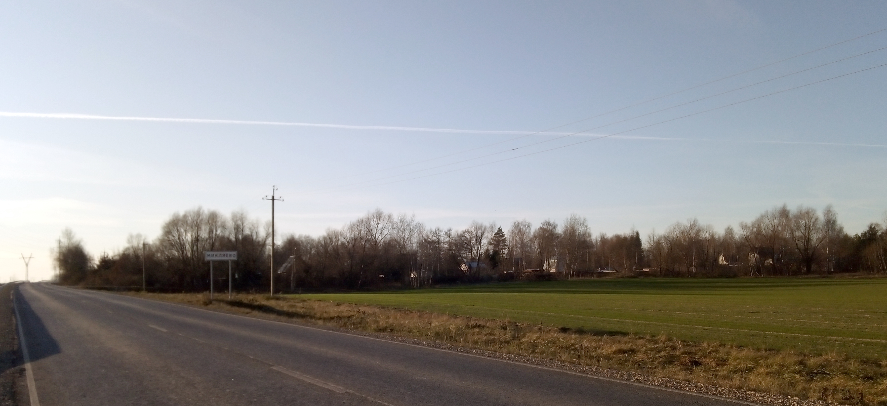 Микляево со стороны Подвязново.